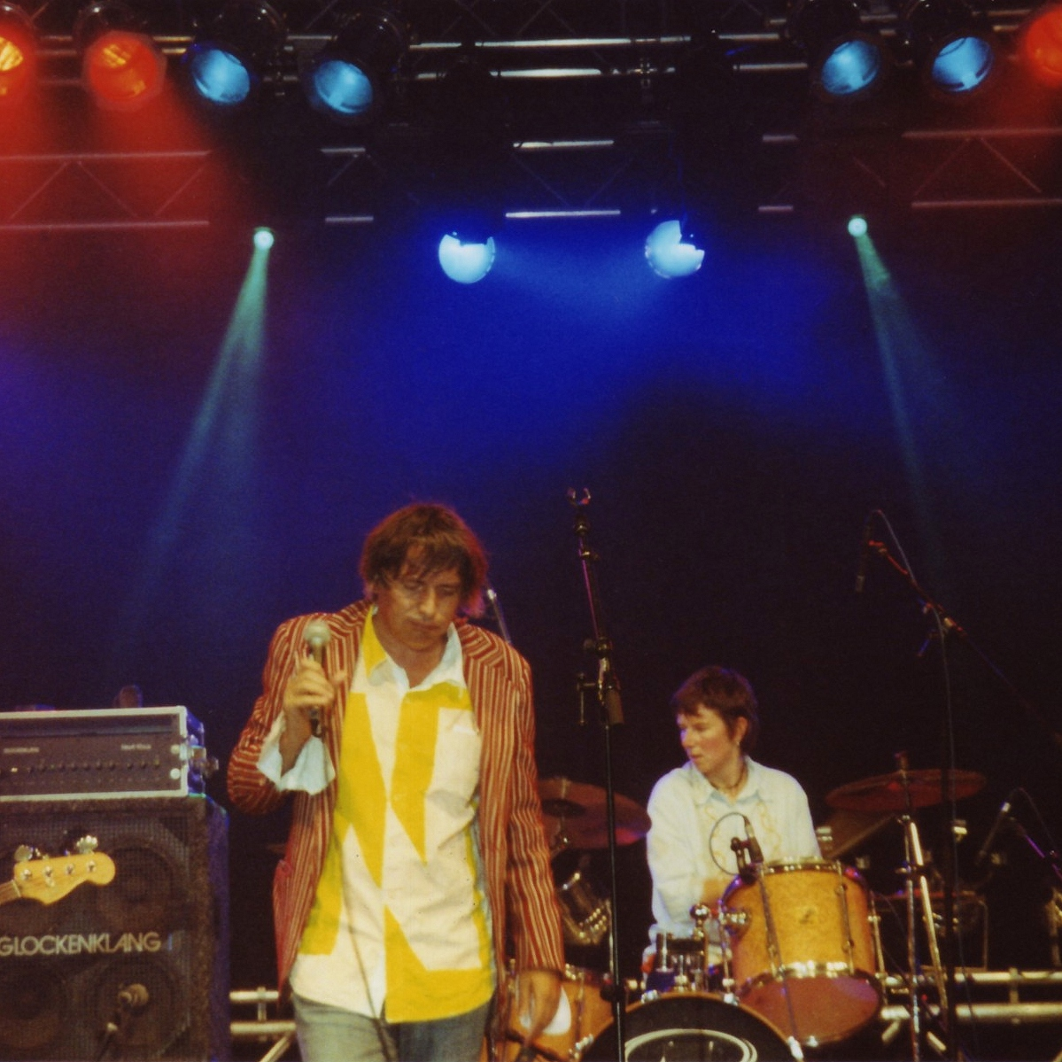 Die Band Fehlfarben beim Open-Air-Konzert „Seegeflüster“ in Hagen – Sänger Peter Hein (links) und Schlagzeugerin Saskia von Klitzing (rechts).